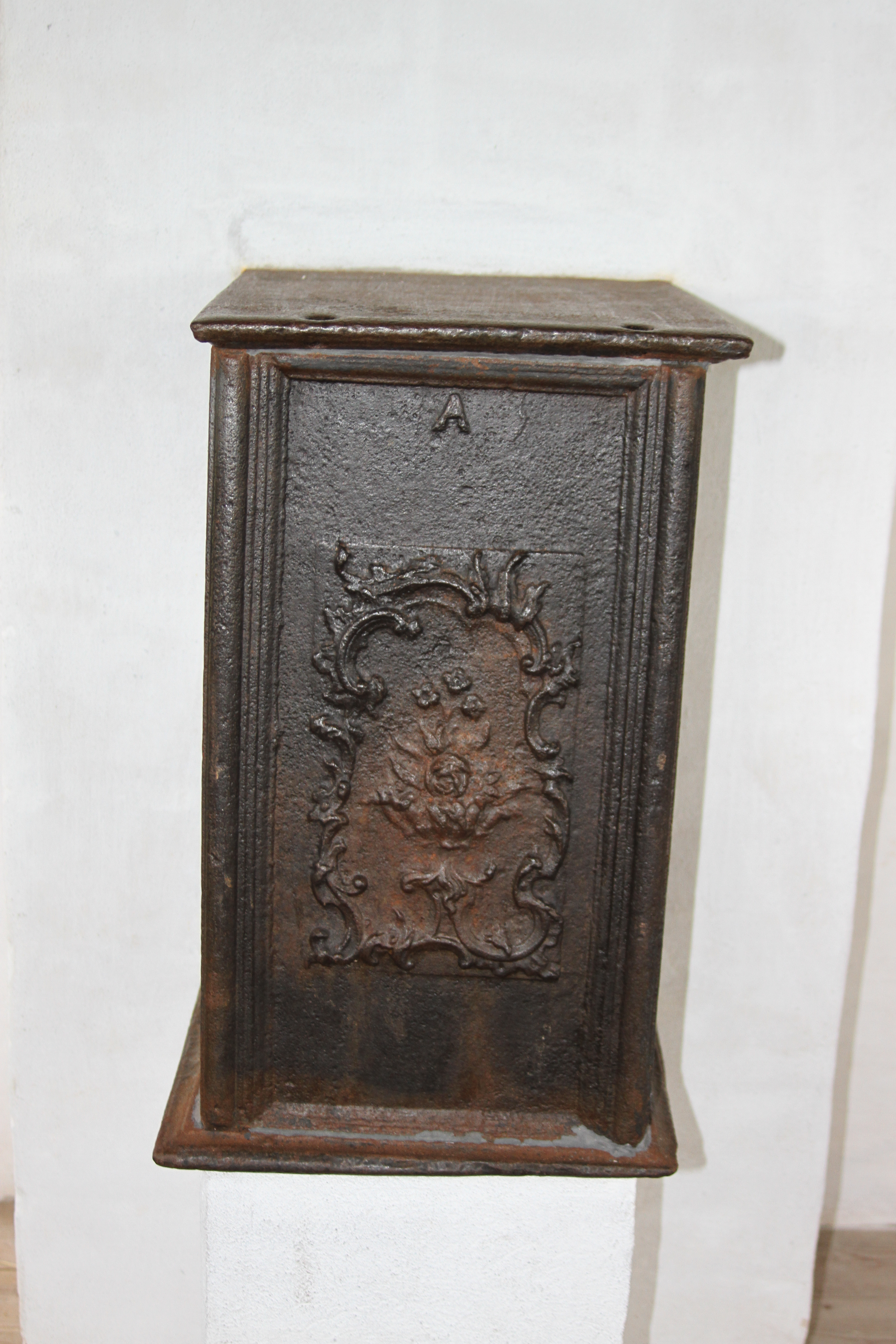 Ofen für den Klassenraum in der kleinsten Schule Dänemarks. Die Jungen hatten reihum Heizmaterial wie Holz, Heidekraut und Torf mitzubringen, welches zum Aufwärmen des Klassenzimmers genutzt wurde